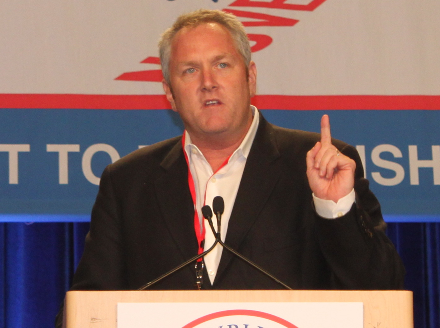 From GOP fundraiser in Anaheim, 10-16-10